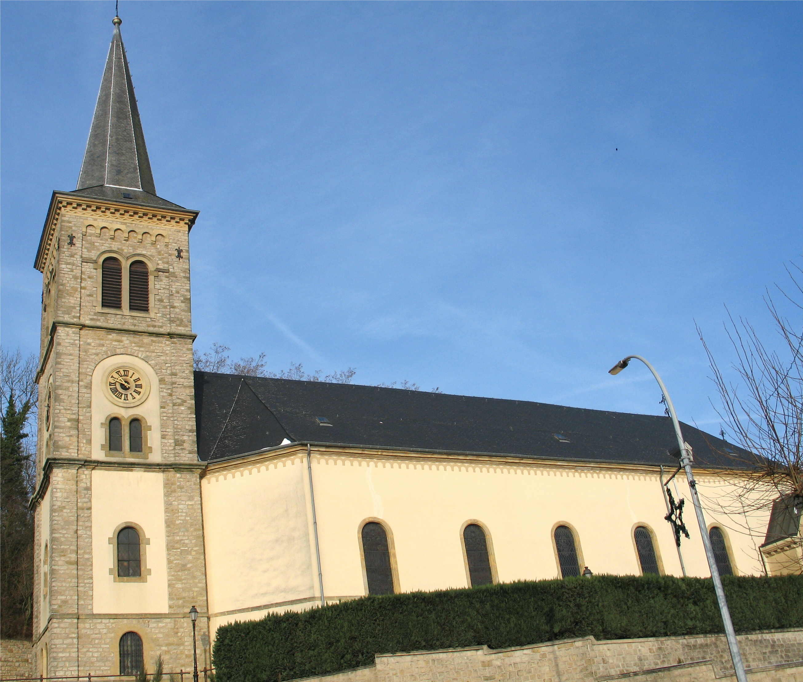 Kierch zu Izeg